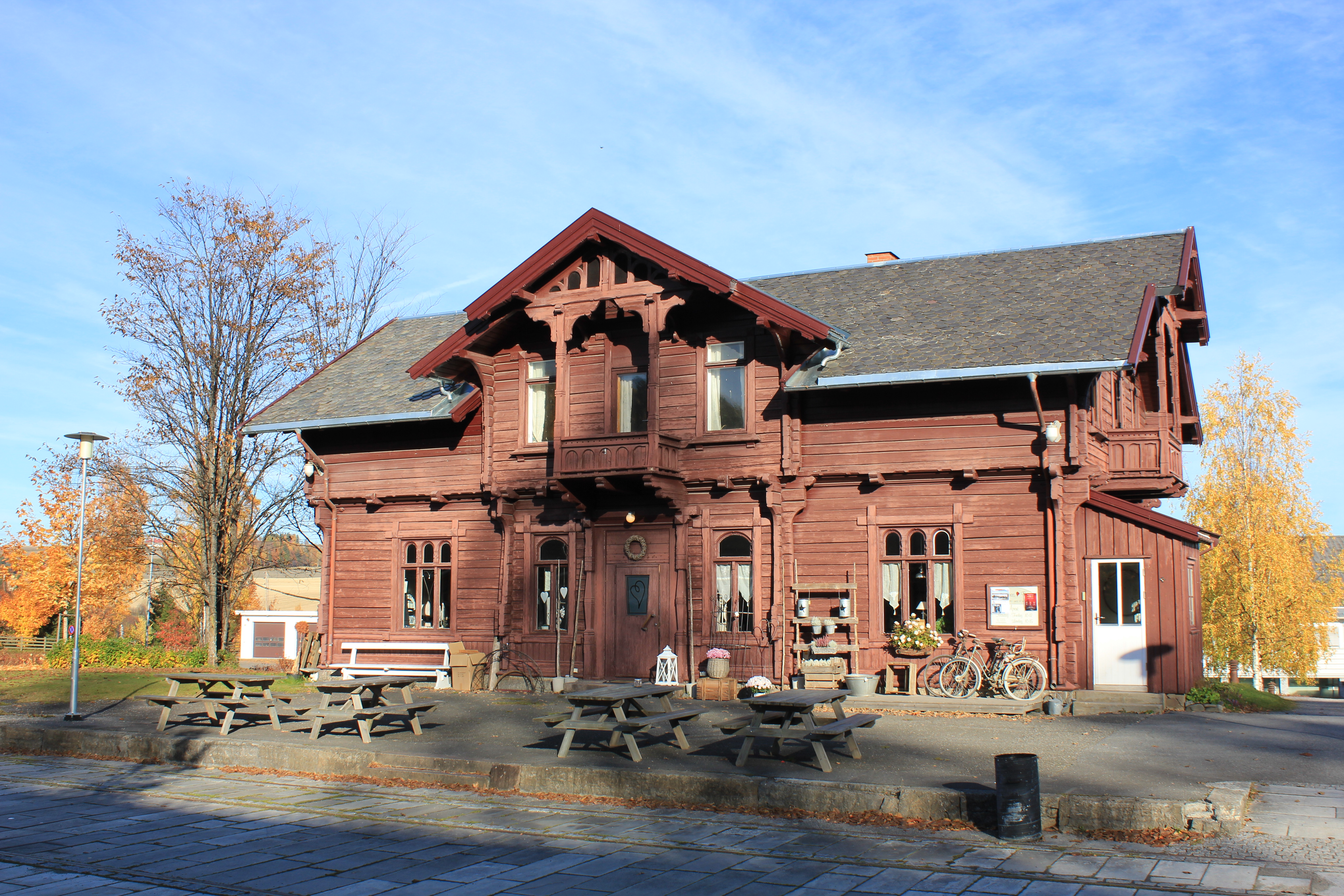 Jernbanestasjon på Skreia.